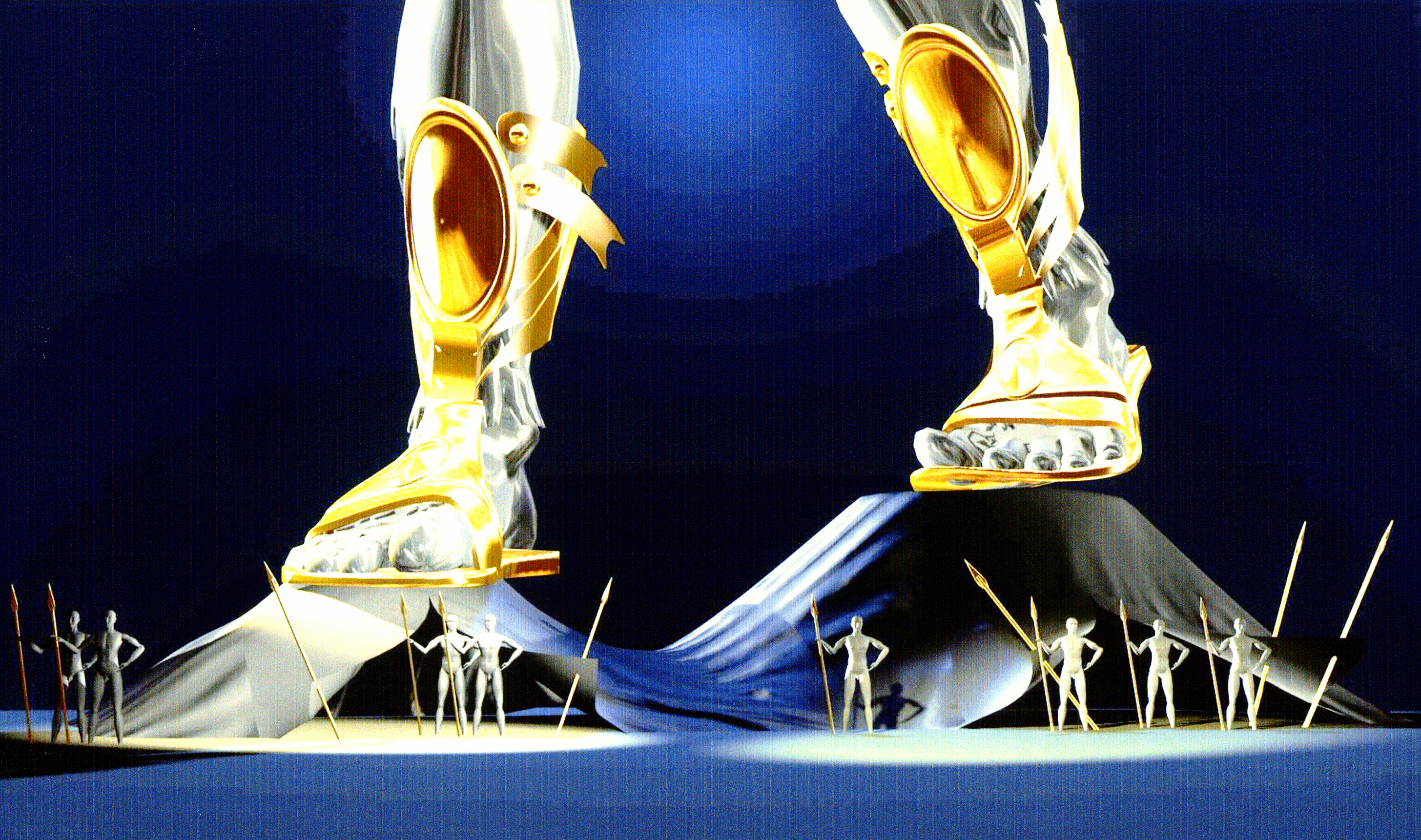 Сценография спектакля "Норма"